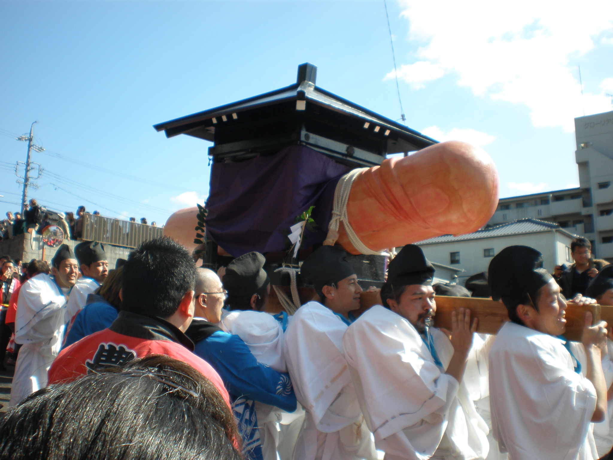 愛知県小牧市の田縣神社で行われる豊年祭。直径60cm、長さ2m余りの大男茎形（おおおわせがた）